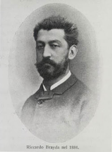 Riccardo Brayda. Dal sito di Fondazione Torino Musei